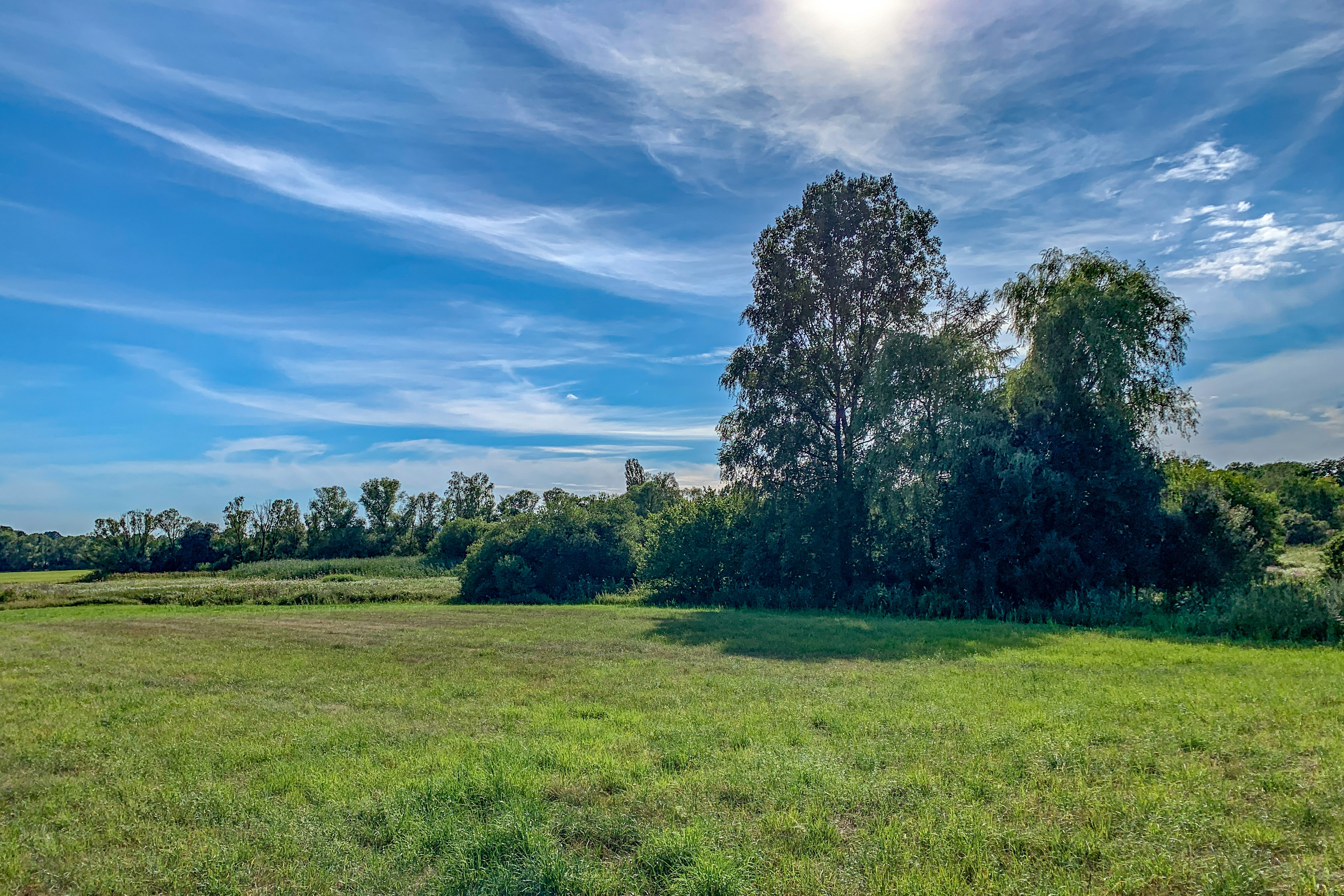 Blick aus Richtung Altstadt auf das Naturschutzgebiet Kühnbruch